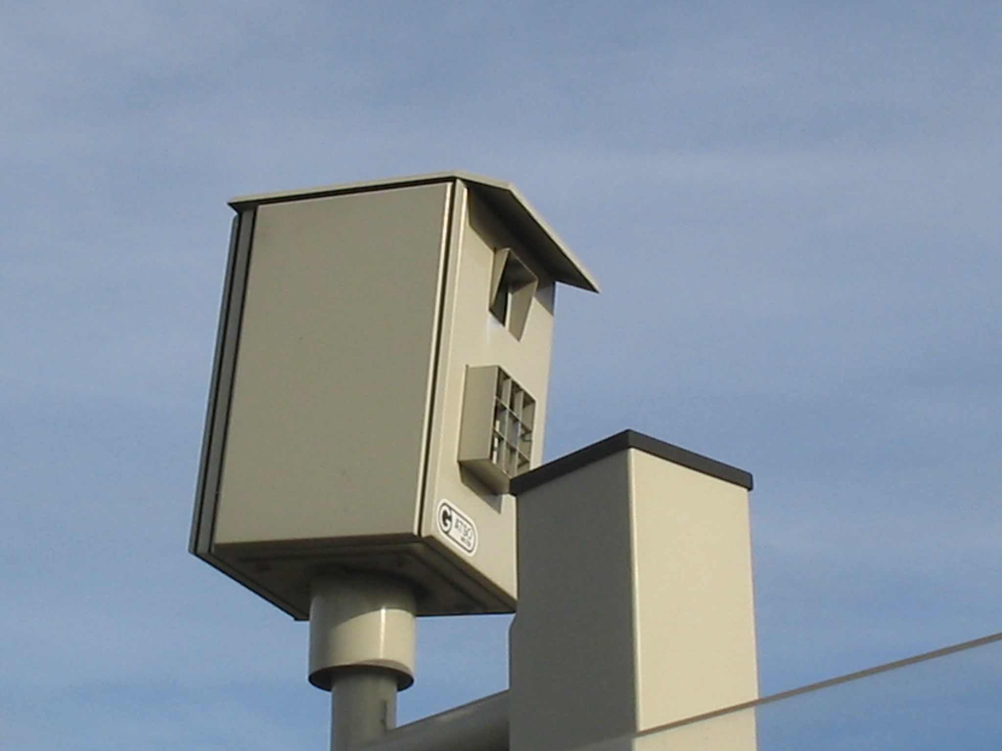 Flitspaal, 6 november 2005